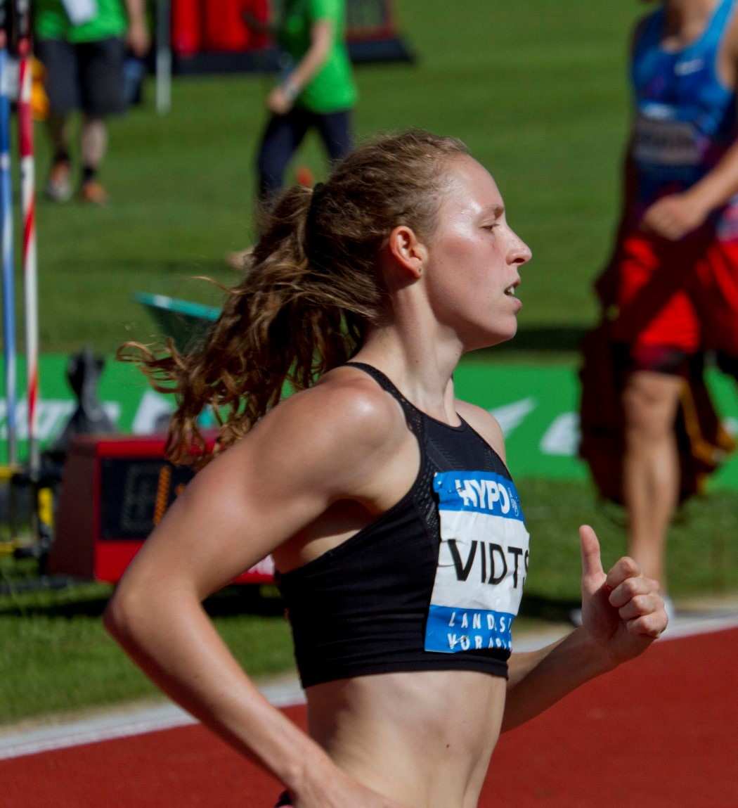 444 vidts 800m